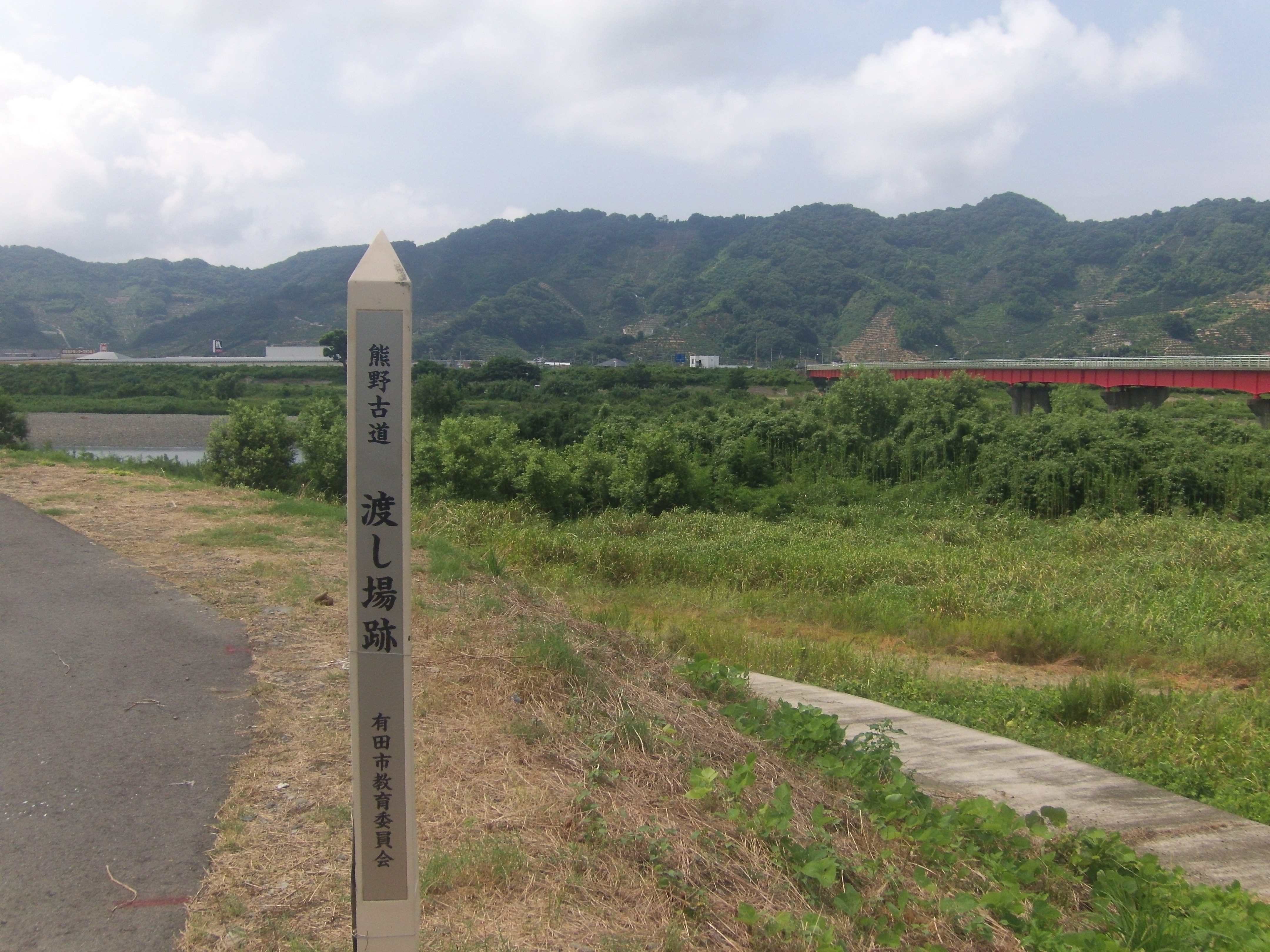 熊野古道・紀伊路の有田川を渡るための宮原渡し場跡